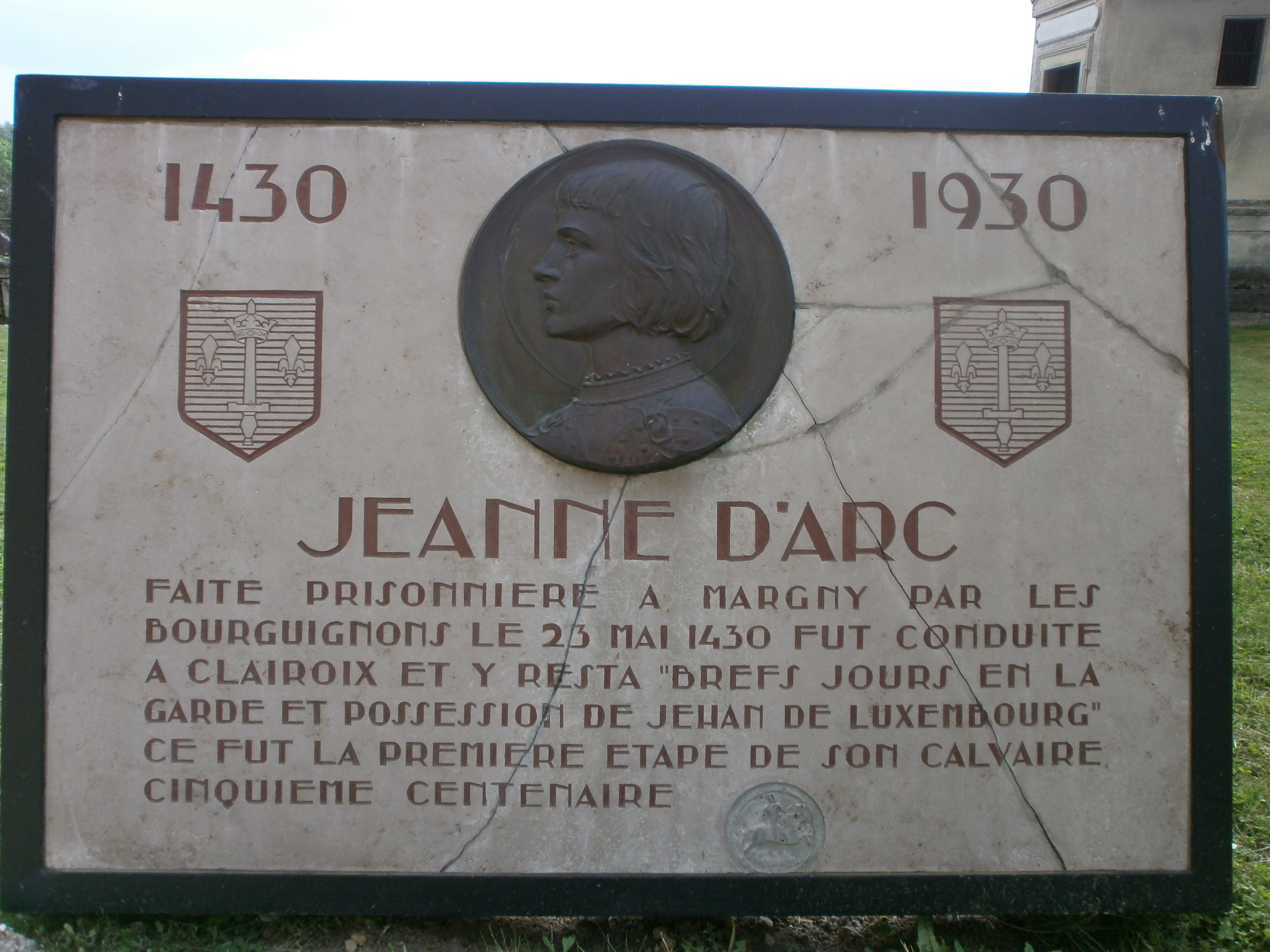 Plaque coimmémorative du passage de Jeanne d'Arc à Clairoix (1930)